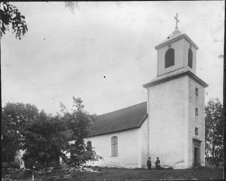 Kyrkan från nordväst. Kategori: (01) ExteriörerKyrkan från nordväst.